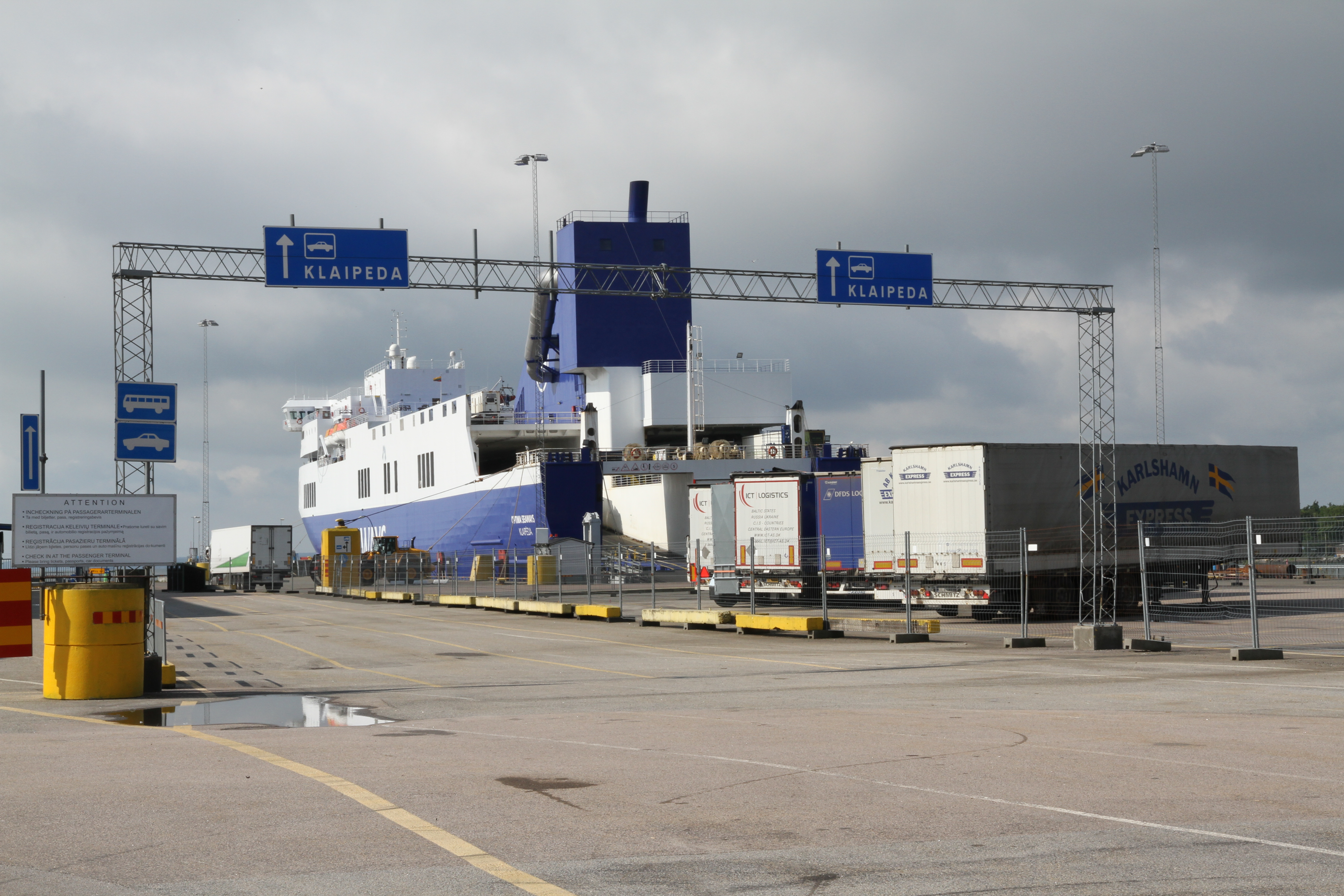 Stillerydshamnen, Karlshamn 15 juli 2014